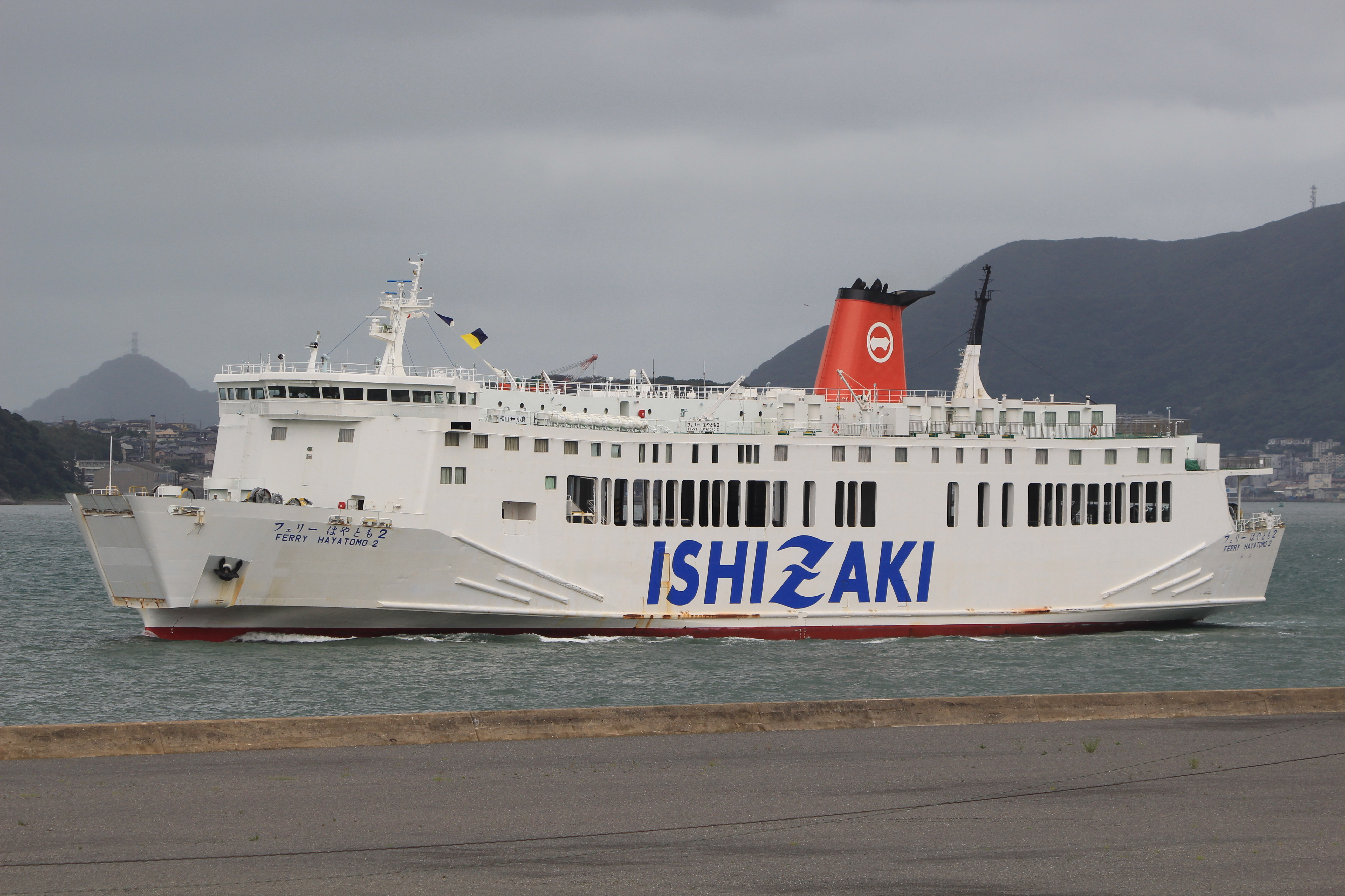 ISHIZAKIロゴが入った新塗装。2019年9月撮影